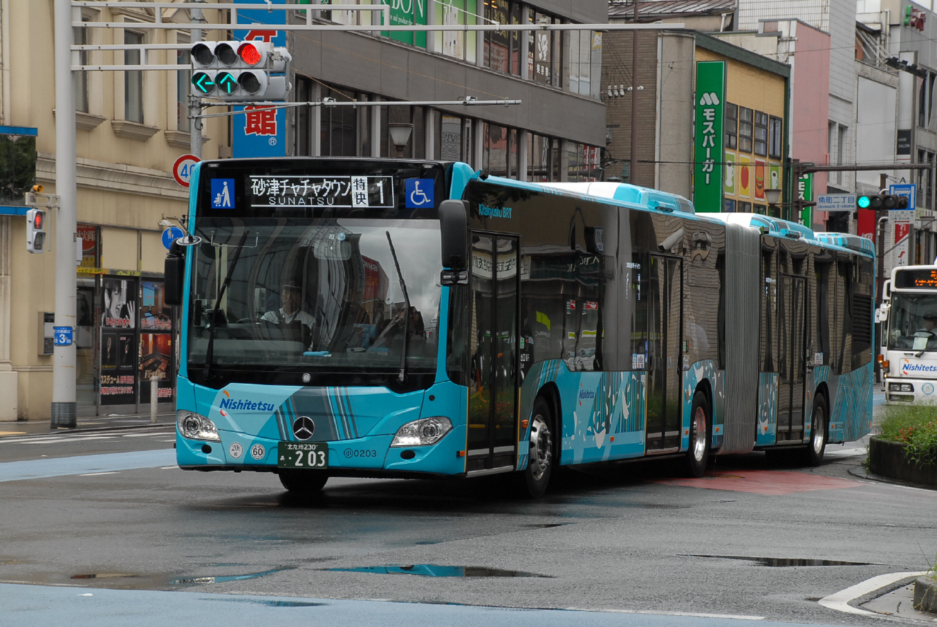 平和通りで撮影